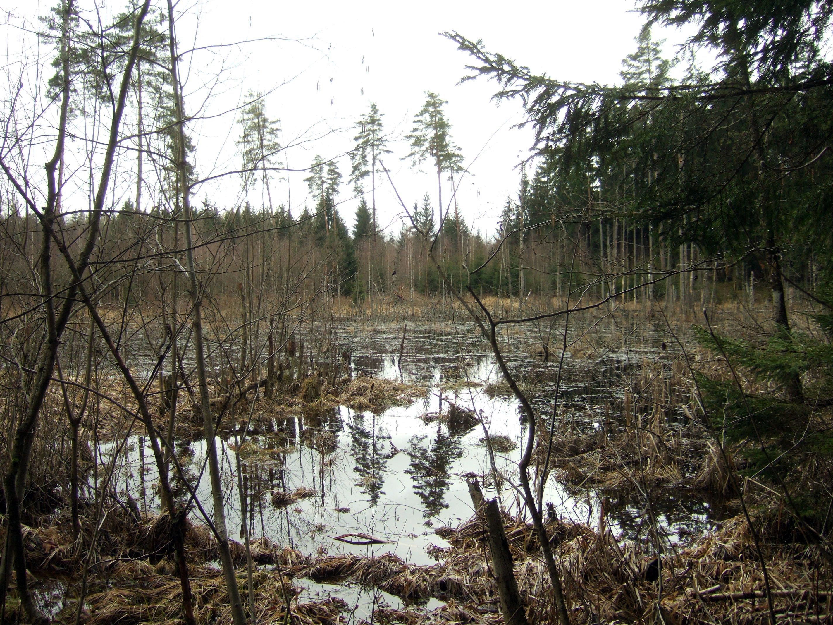 Raudonoji bala